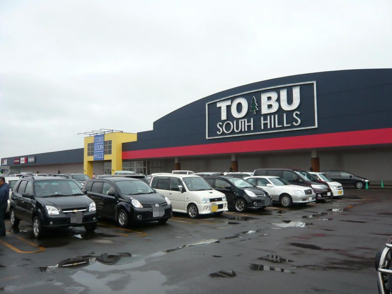 中標津町の東武サウスヒルズ